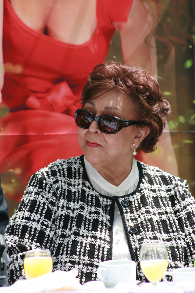 Marisa Garrido en el 2011